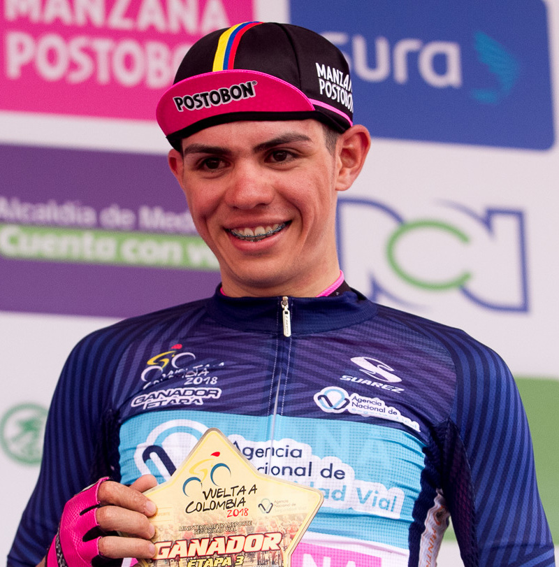 3.ª Etapa de la Vuelta a Colombia 2018 - Ciclista Sergio Higuita - Podio ganador de etapa.